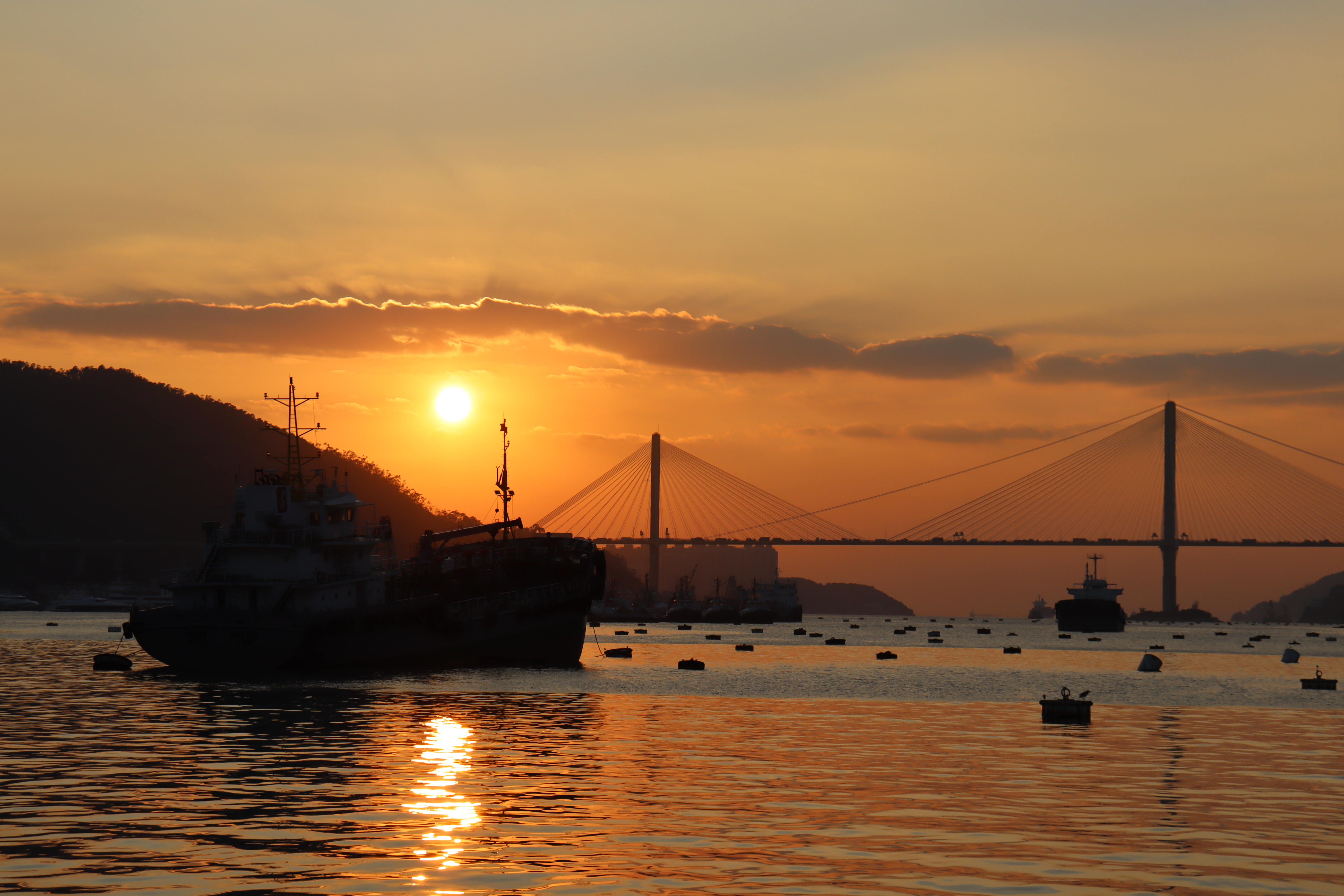 中文（香港）: 從藍巴勒海峽遠眺汀九橋日落